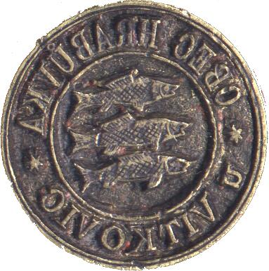 Pečetidlo obce Hrabůvka.